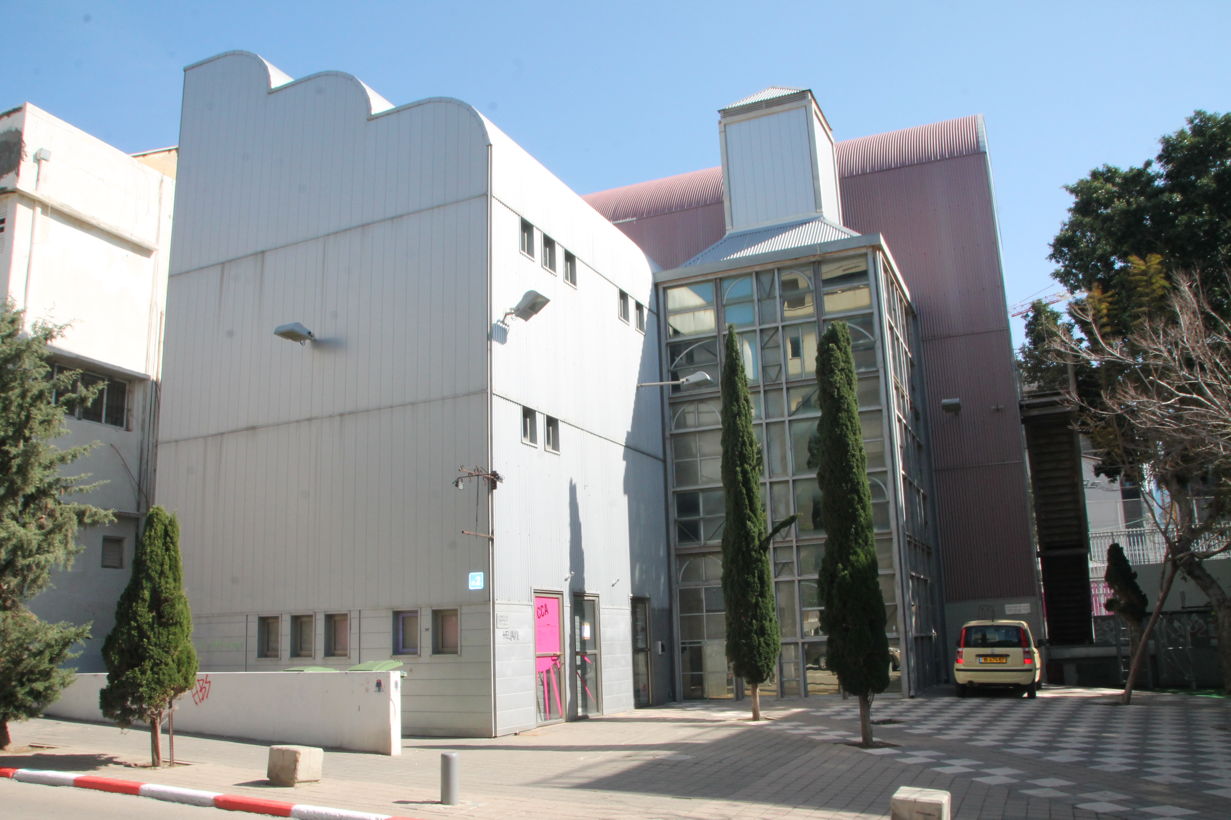 בית הספר לאמנות קלישר מבנה 2